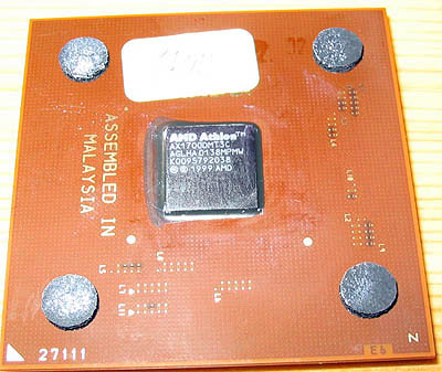 AMD Athlon XP "Palomino" 1700+ Caricato dalla wiki tedesca